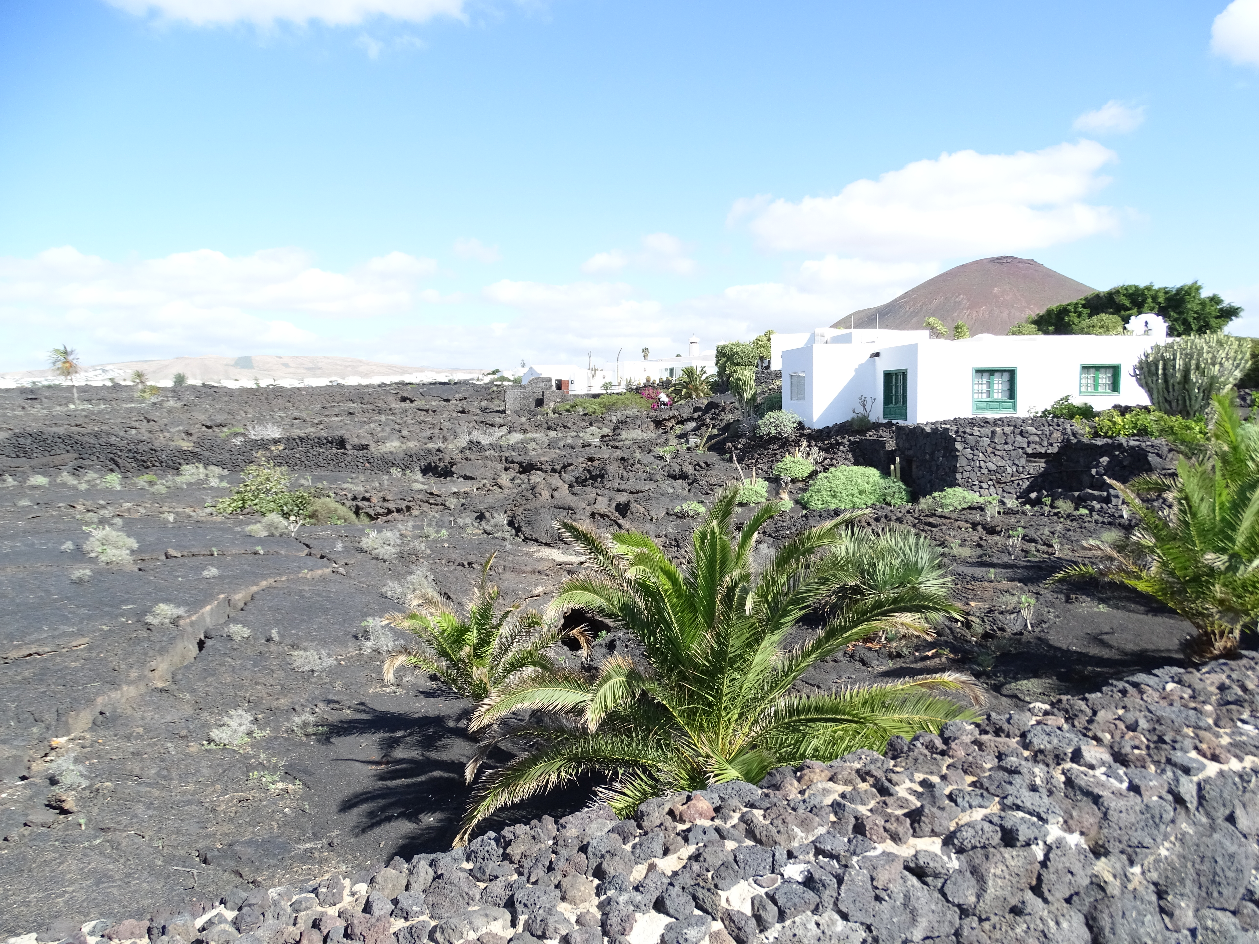 Lavalandschaft in Taro de Tahíche, Ort von Tahíche, Lanzarote, Kanarische Inseln